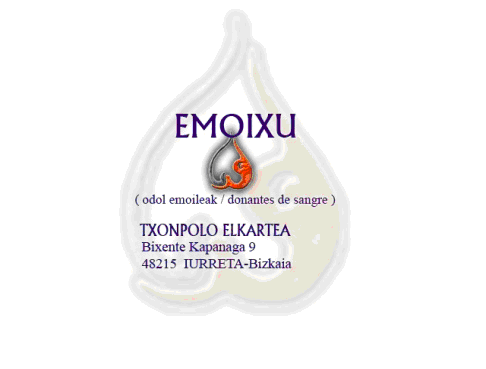 Emoixu elkartearen logoa